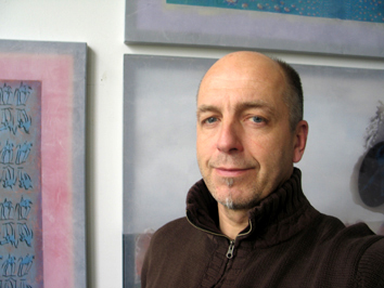 Der Künstler und Auststellungskurator Harro Schmidt in seinem Atelier - Selbstporträt ..